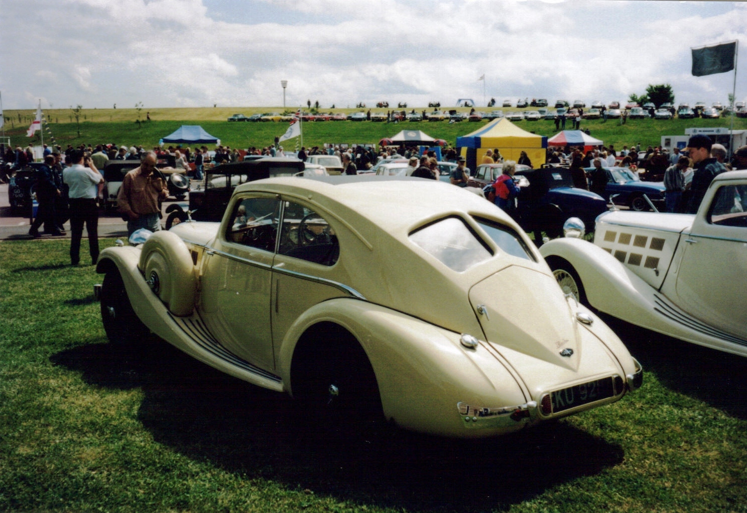 Triumph Vitesse "flow free", einziger existierender Wagen. Foto in England